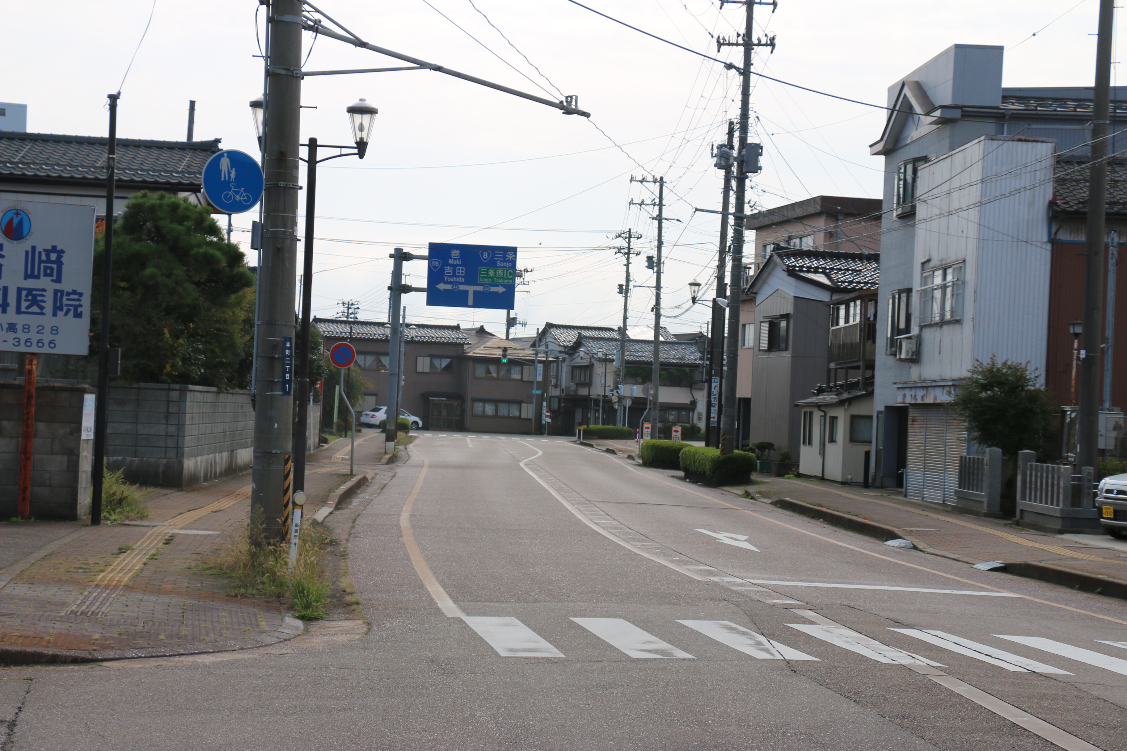 燕駅から起点方向を臨む